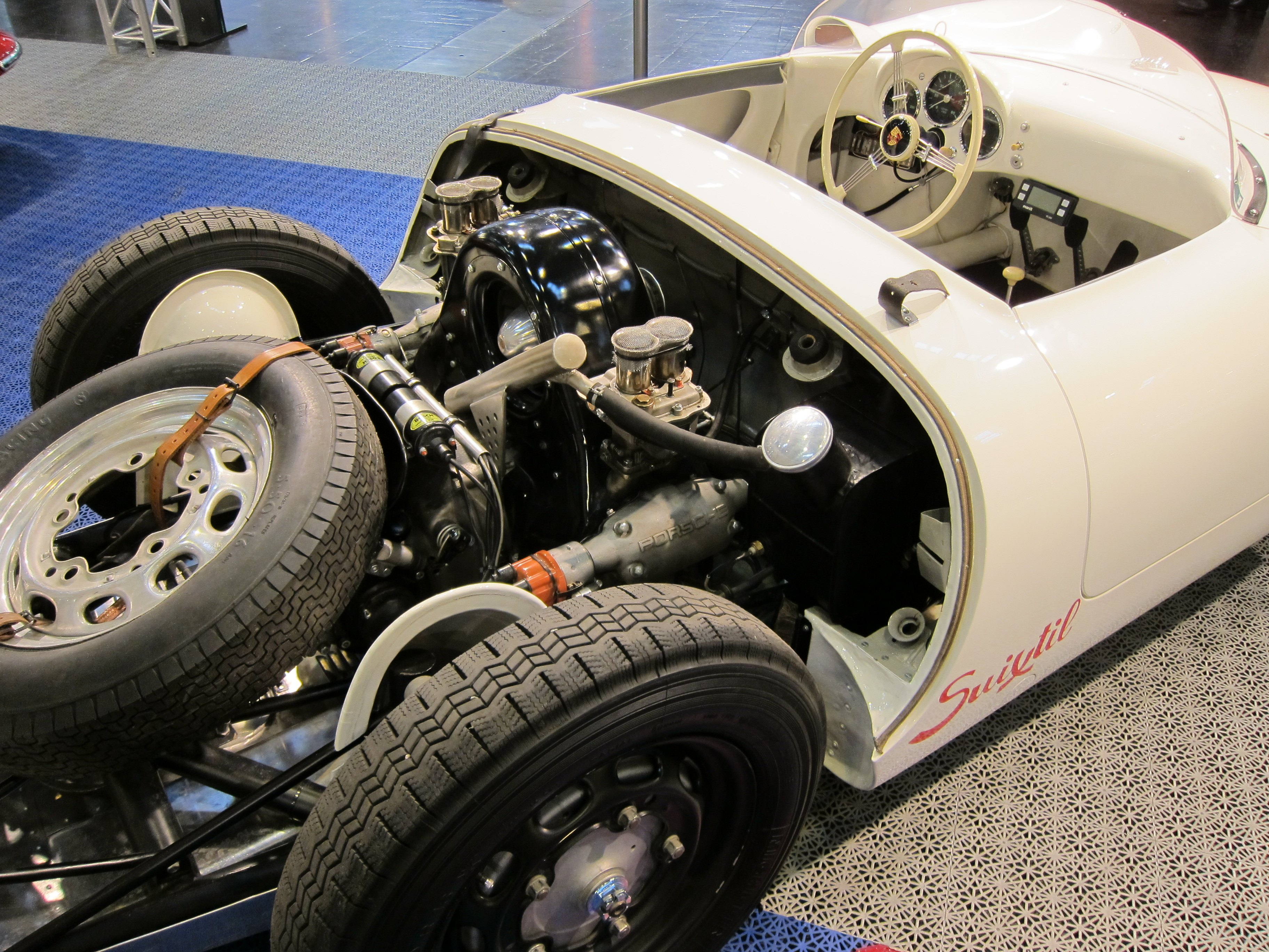 Techno Classica 2011